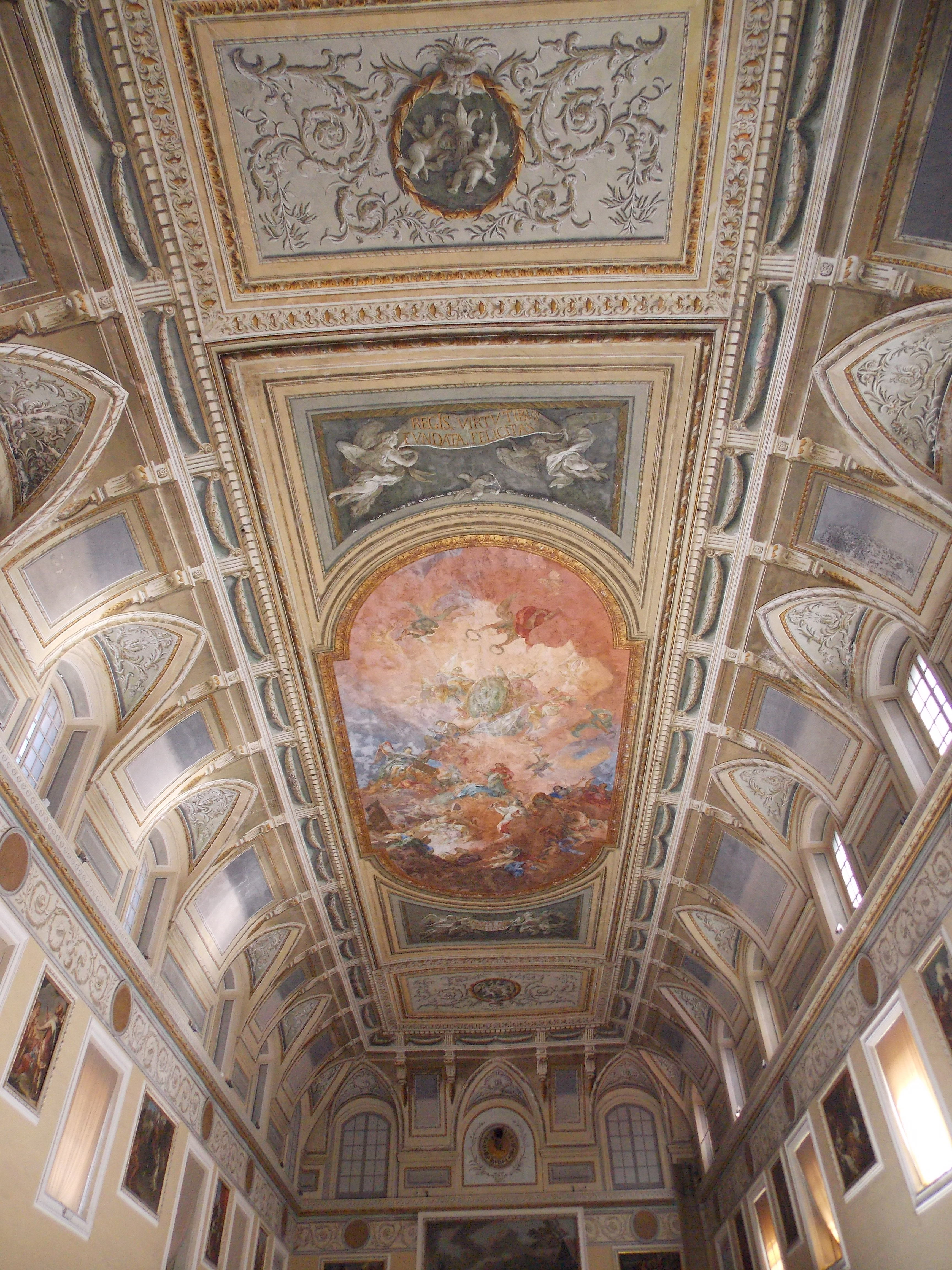 Museo Archeologico Nazionale di Napoli This is a photo of a monument which is part of cultural heritage of Italy.